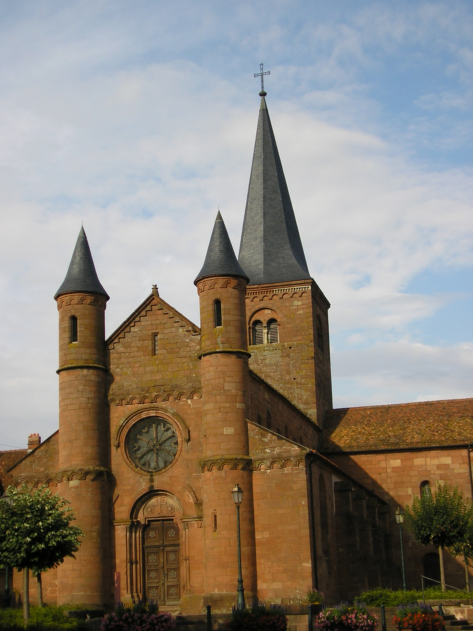 église st adelphe